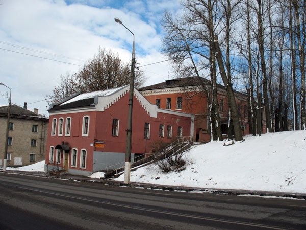 Віцебск. Калініна-праезд Гогаля